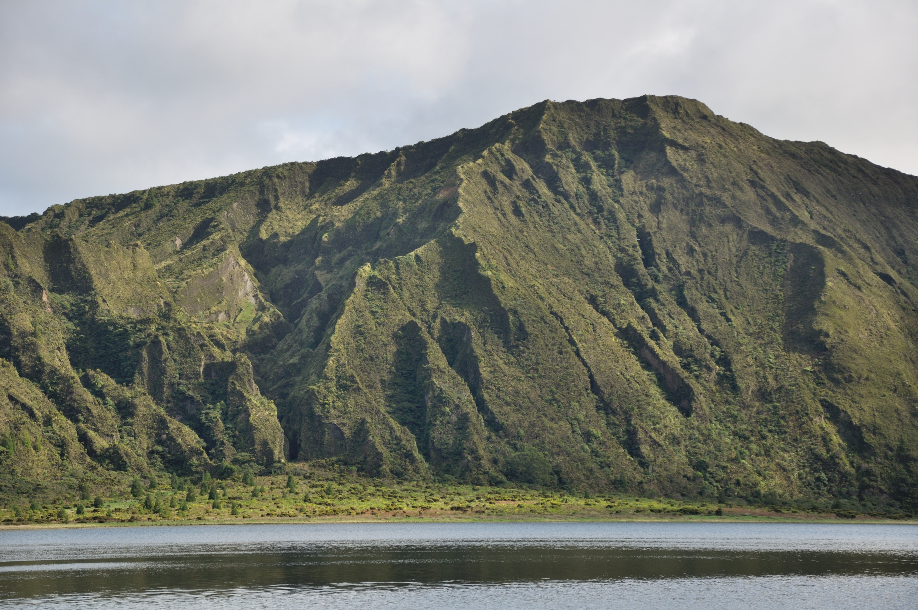 Portugal, hike along Lagoa do Fogo (Azores)